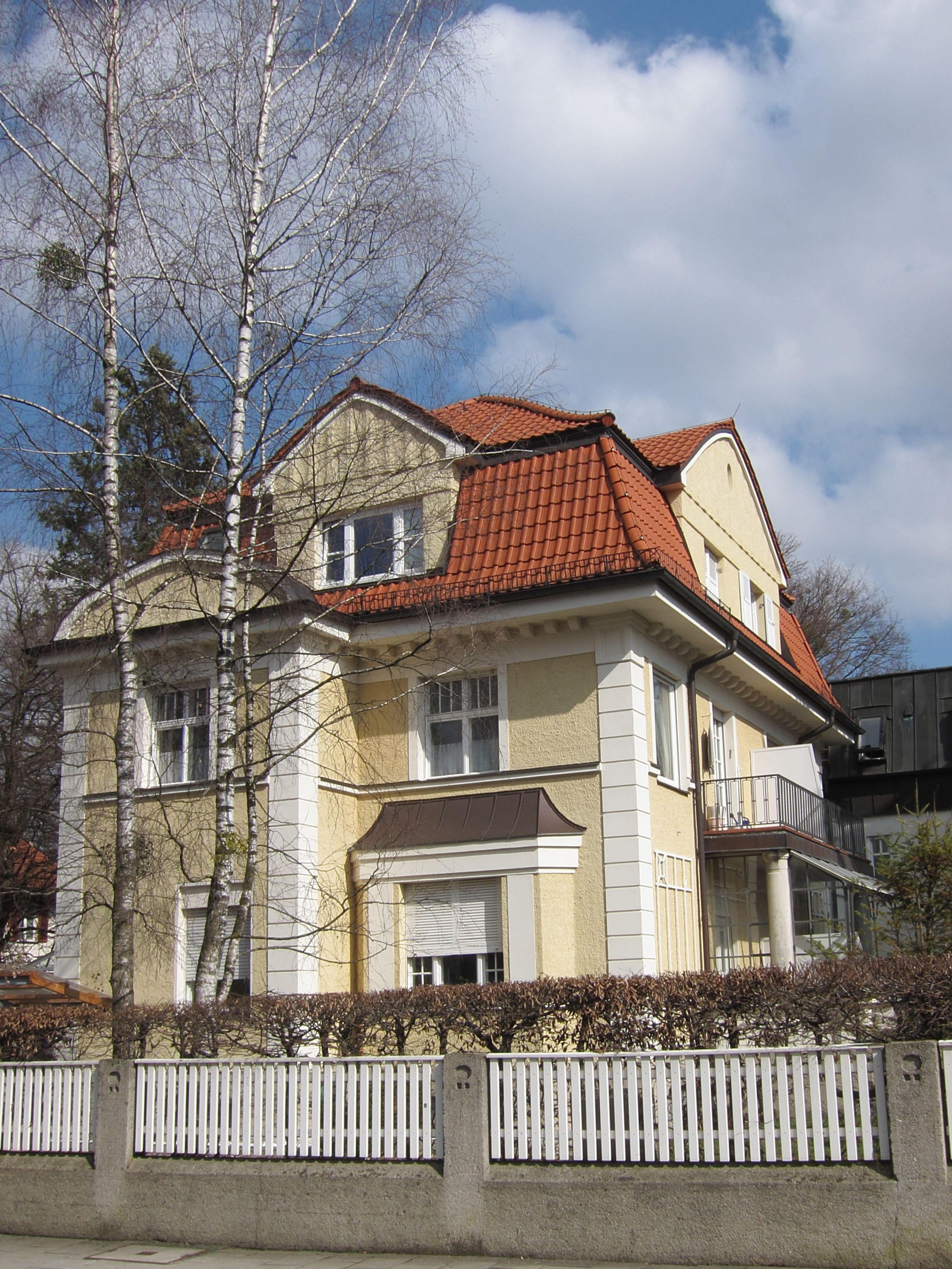 Fritz-Reuter-Straße 34; Villa, historisierend, 1911-12 von Georg Schneider (Bad Kissingen).